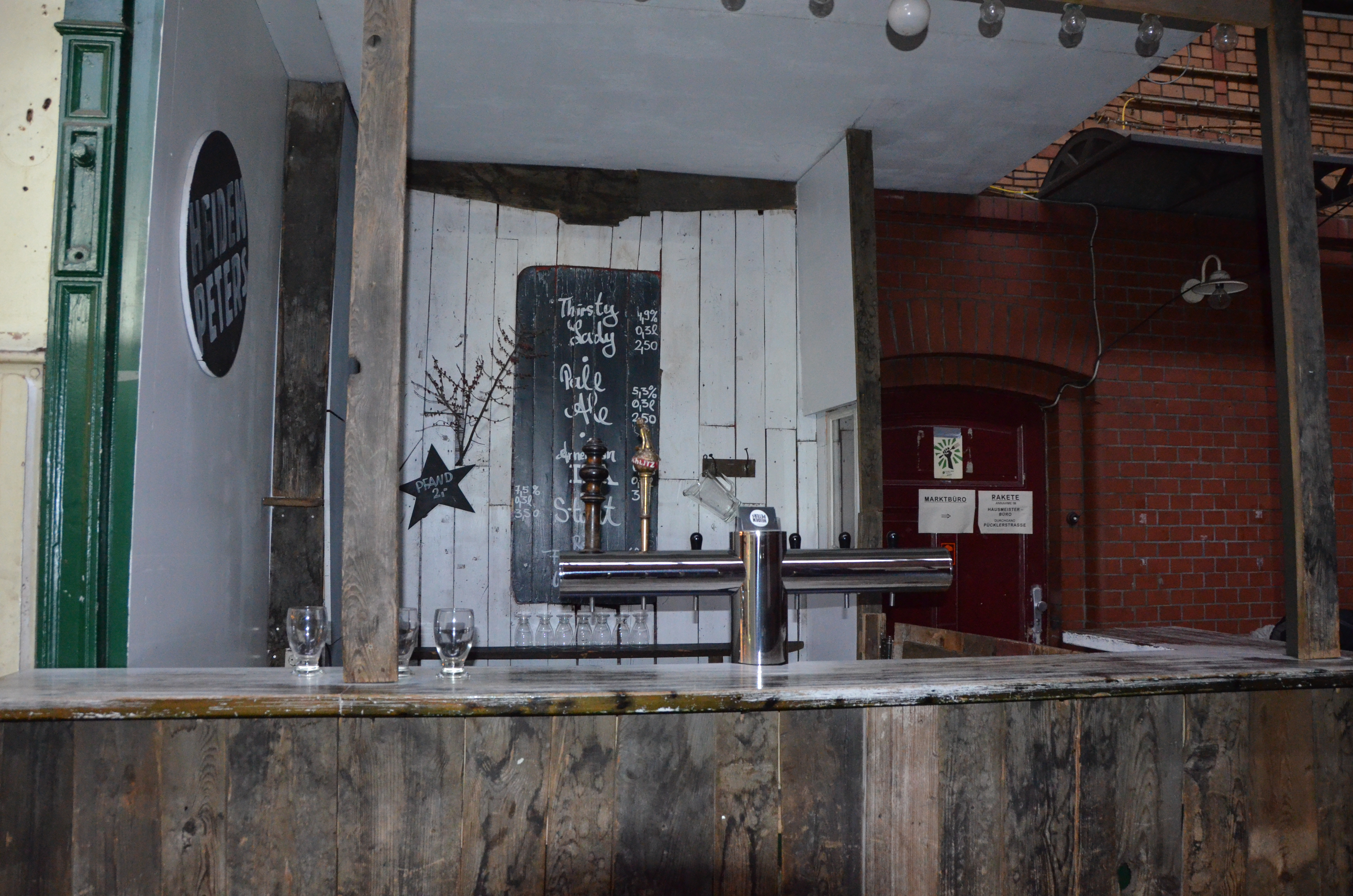 Wir haben es satt! (2016, Markthalle9 Demofrühstück)